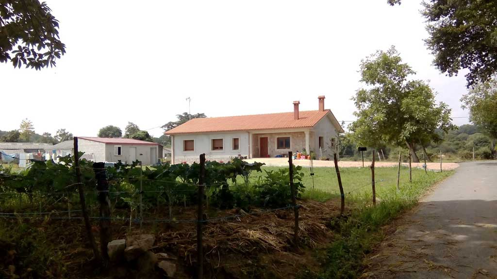 Vista da Fraga, Curtis.